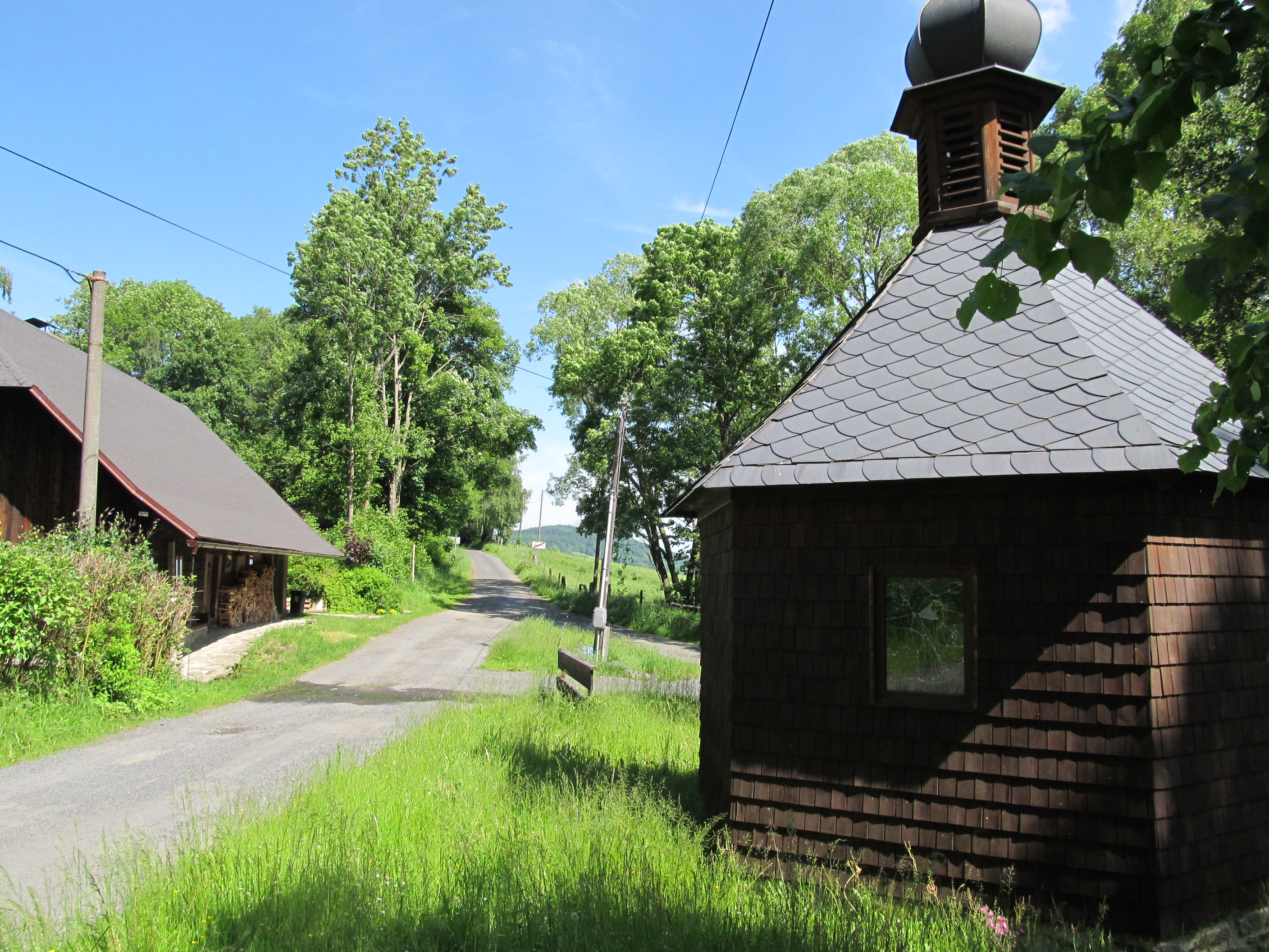 Dřevěná kaplička